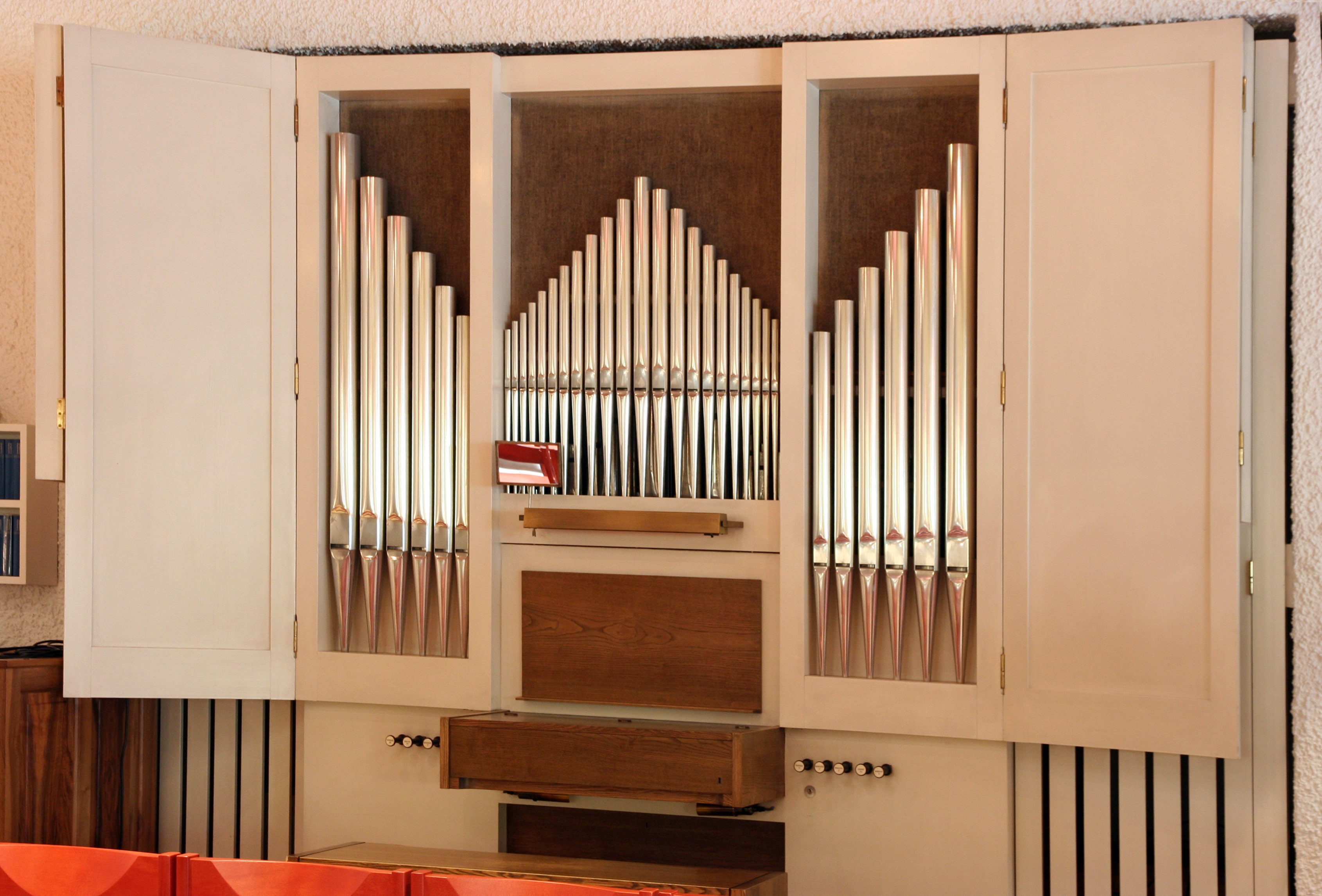 Römisch-katholische Pfarrkirche St. Urban Winterthur-Seen